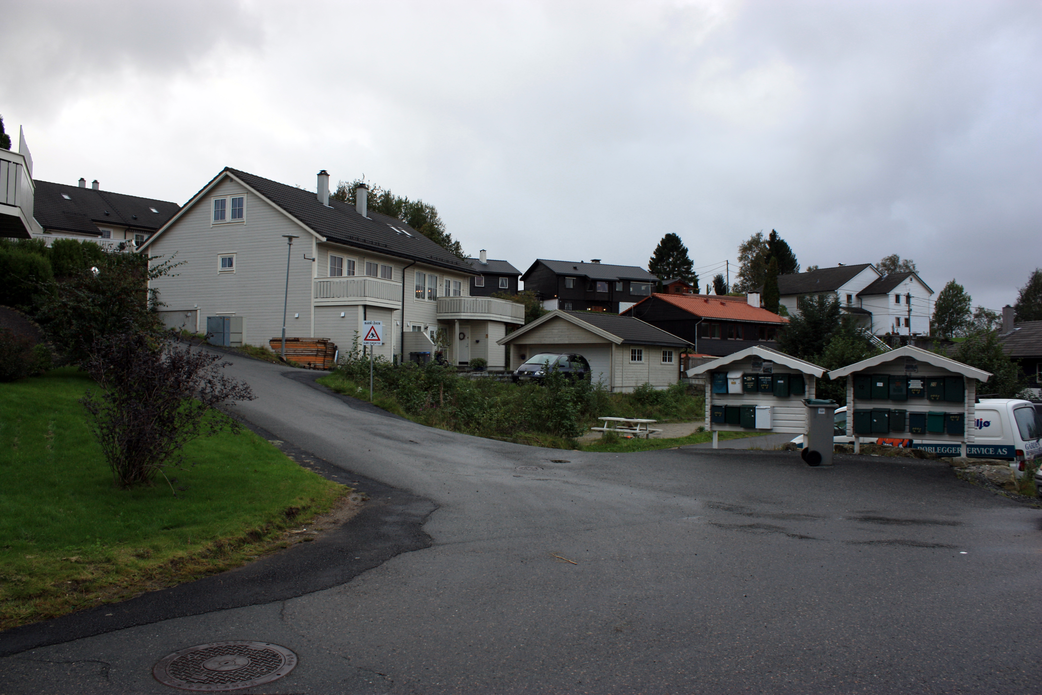 Lilletveitåsen, Fana, Bergen.